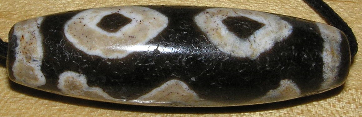 Dzi bead Tibetan bead